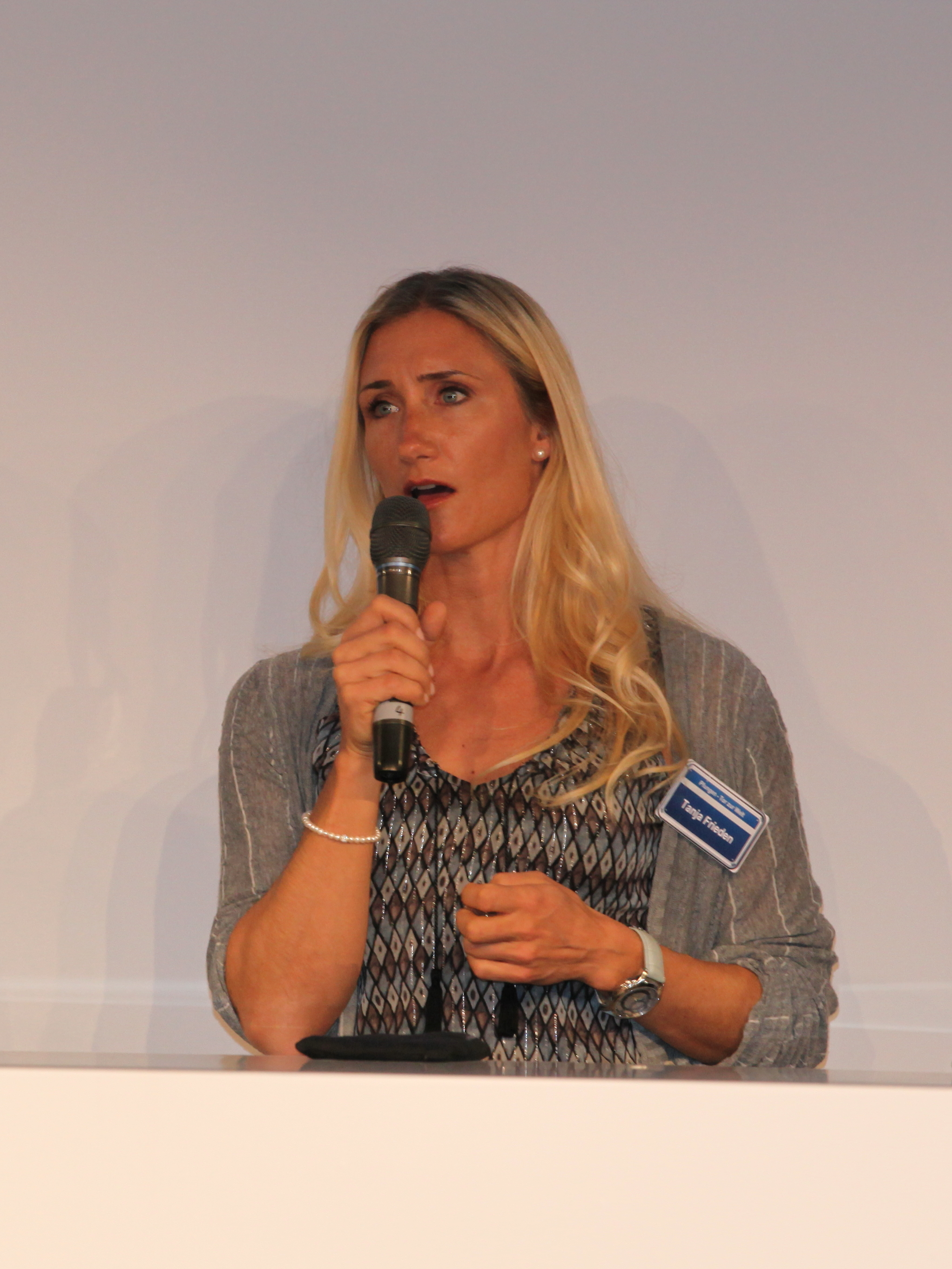 Tanja Frieden auf einer Veranstaltung in Pfungen